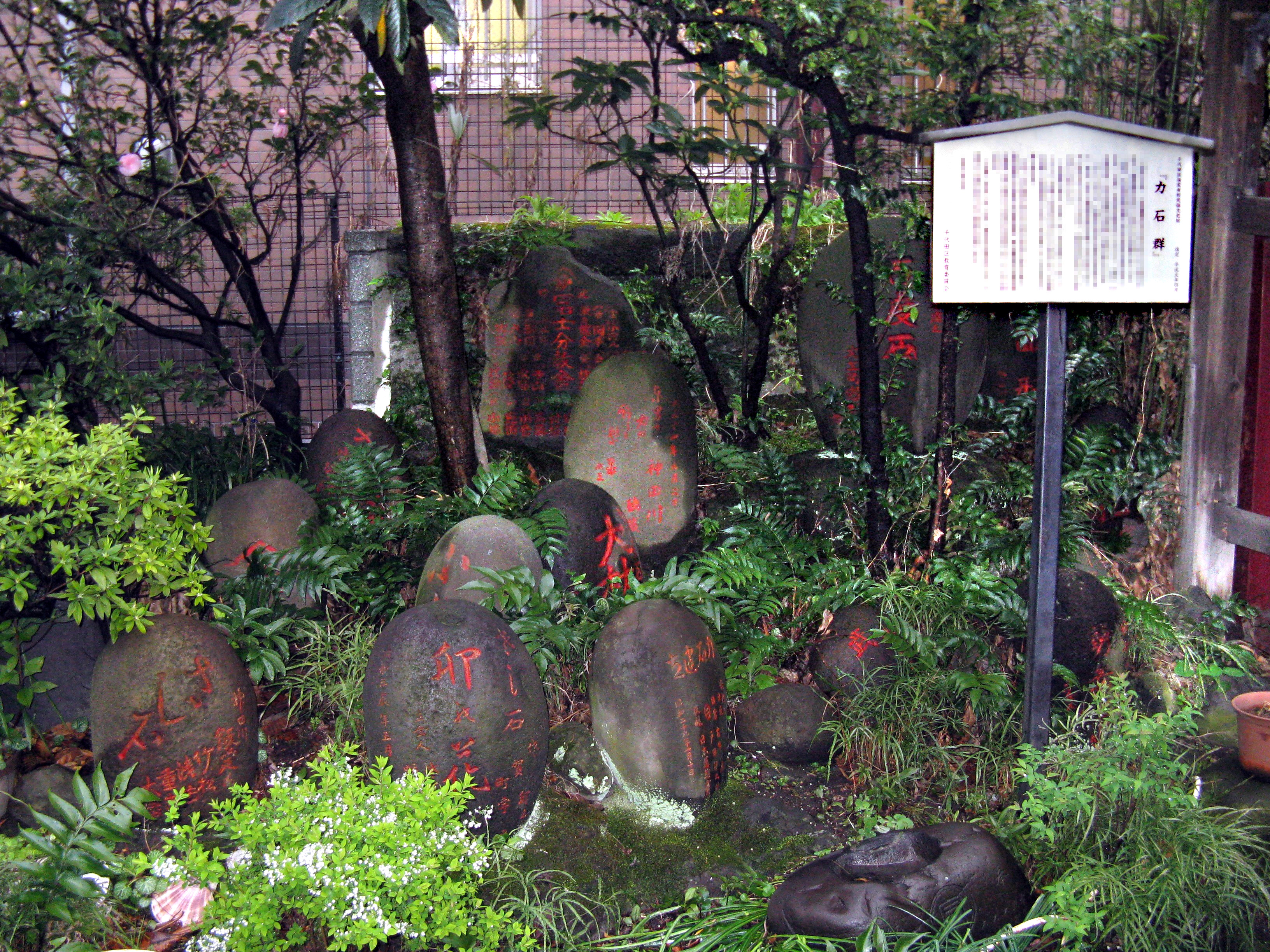 柳森神社 力石